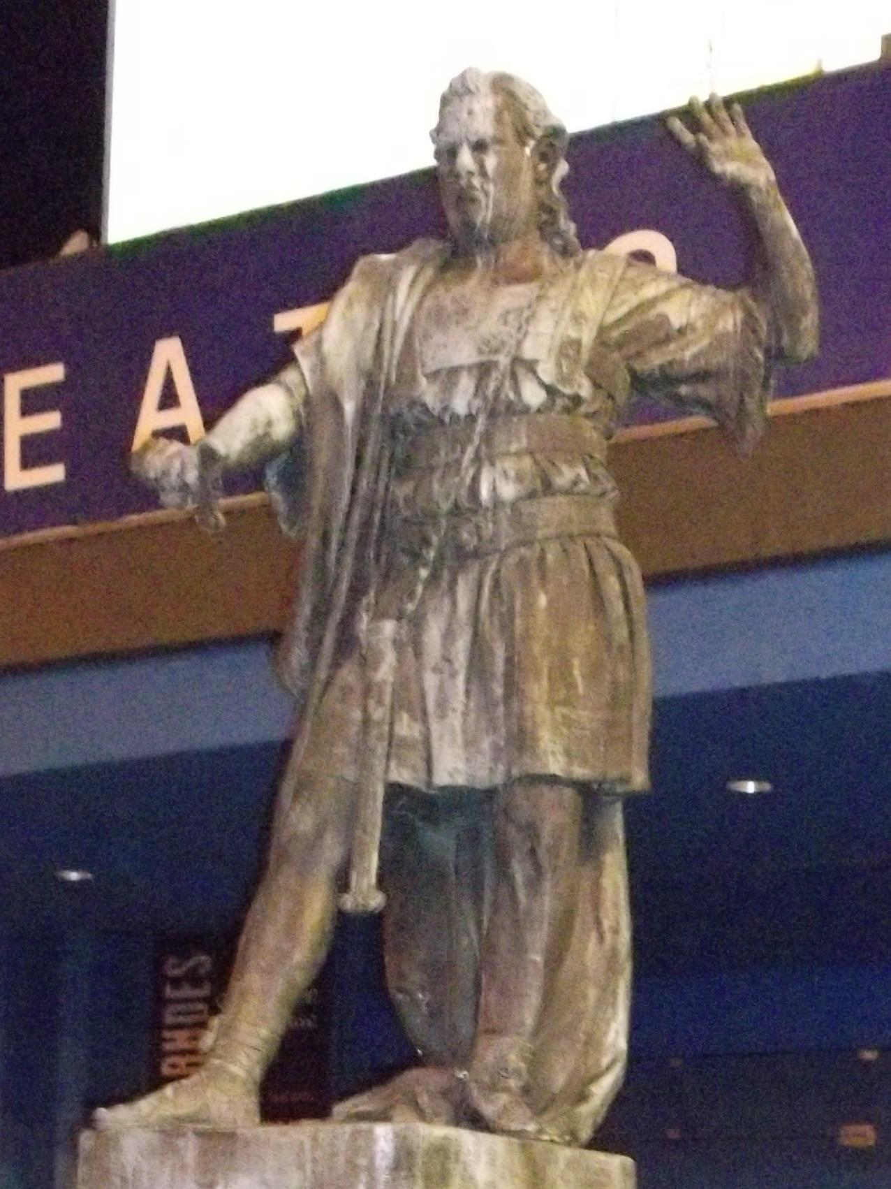 Estátua de João Caetano, em frente ao Teatro João Caetano, cidade do Rio de Janeiro, Brasil.